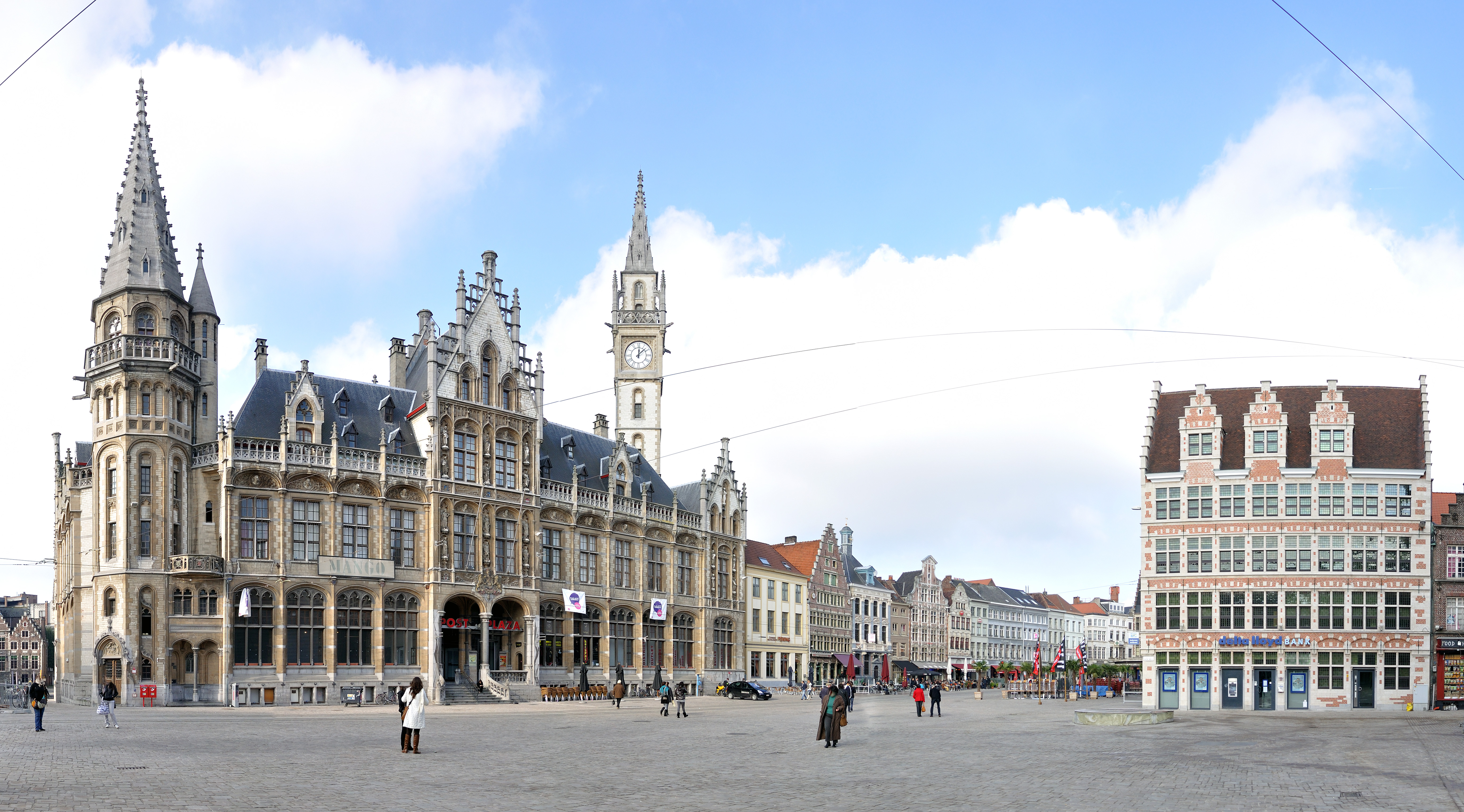 Korenmarkt - Gent, Belgium - November 1, 2010